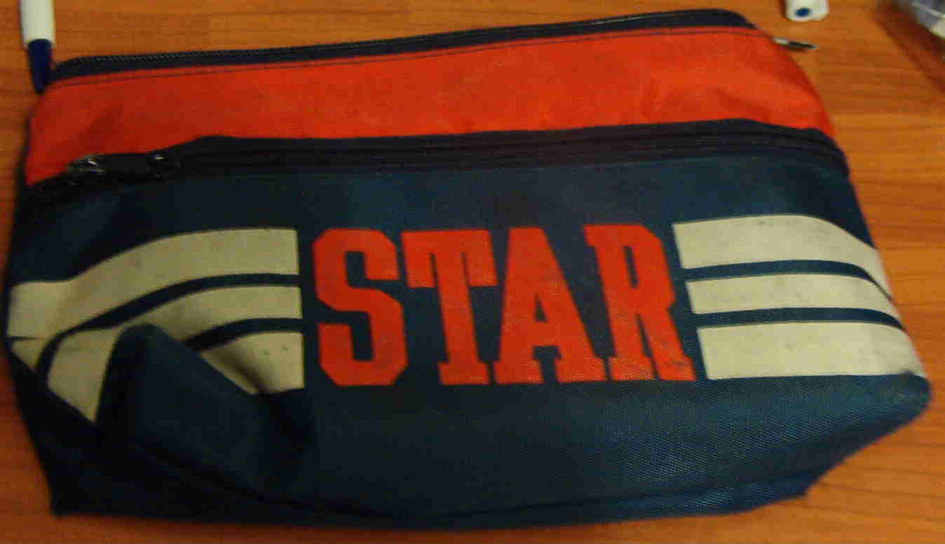 Pencil Case